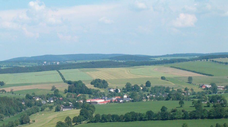 Sicht auf Reichenau vom Frauensteiner Schloss (Ruinenturm)